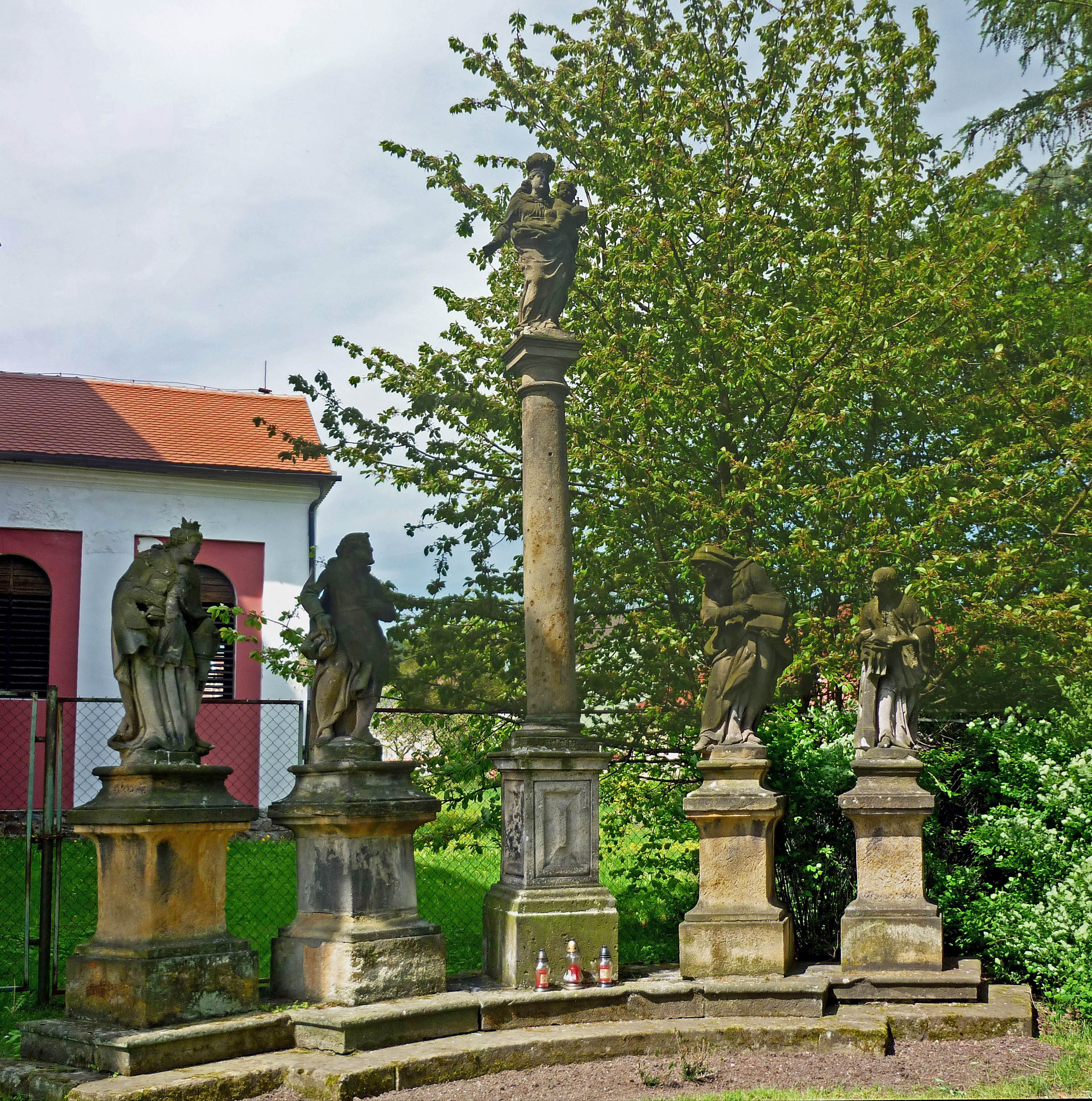 Mariensäule mit Heiligen-Statuen in Klösterle (Klášterec nad Ohří) an der Dreifaltigkeitskirche, urspr. in Brunnersdorf (Prunéřov)